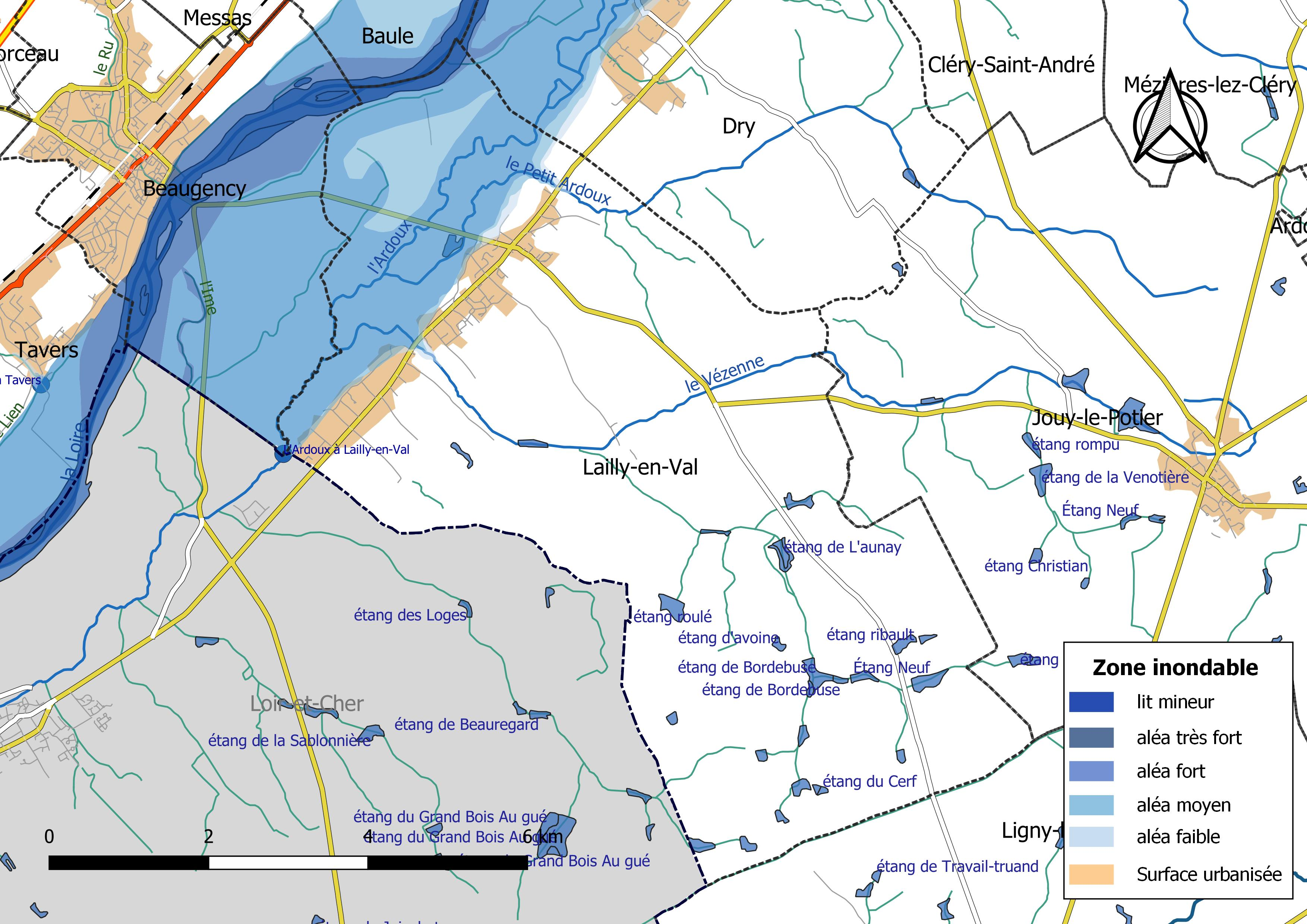 Zone inondable et réseaux hydrographique et routier de la commune de Lailly-en-Val (Loiret, France).